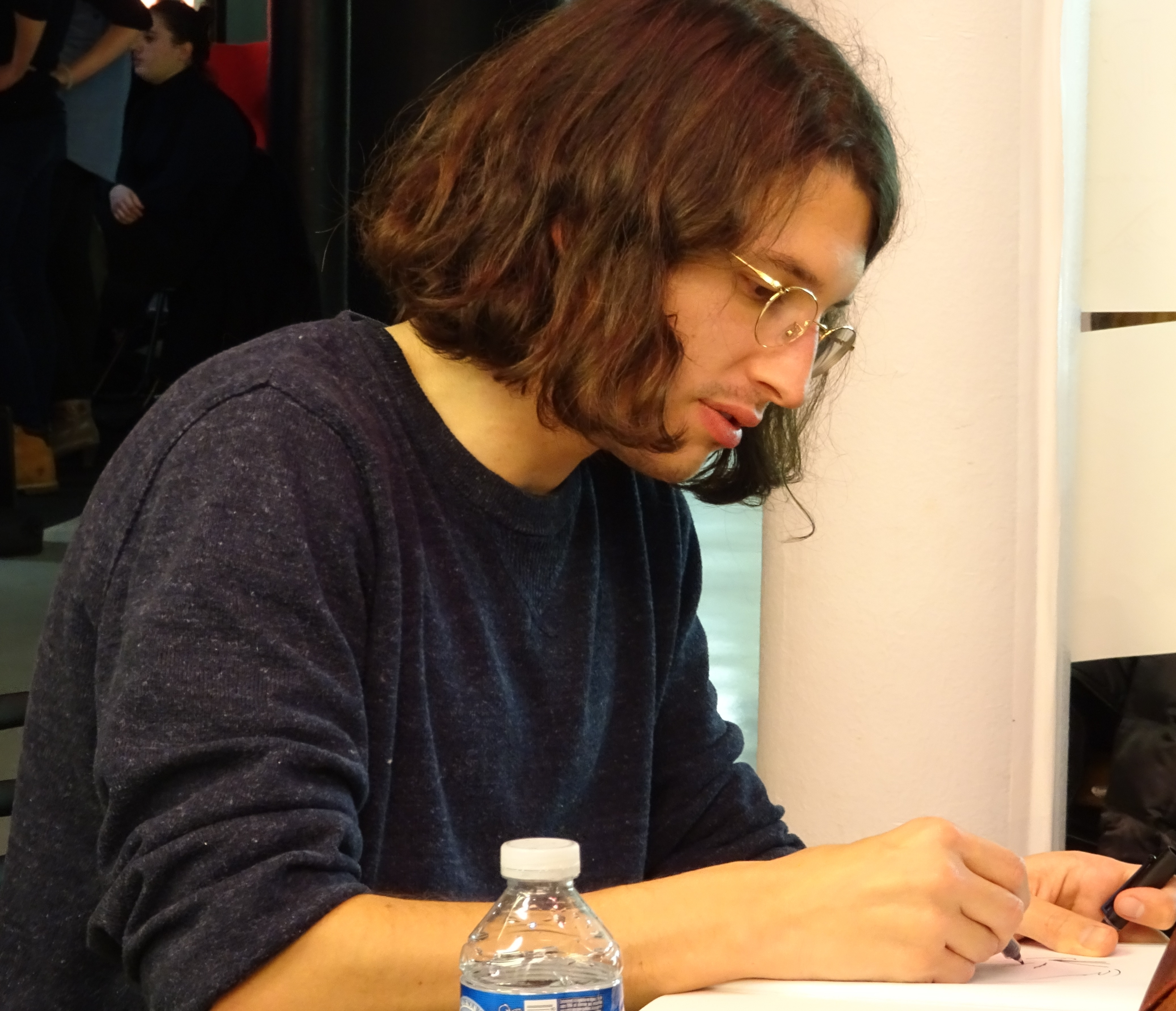 Bastien Vivès est le parrain du Cadavre exquis animé lors du Carrefour du cinéma d'animation 2017 au Forum des images, à Paris. Prise de vue lors de la séance de dédicace.